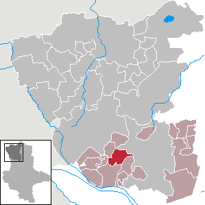 (Original text: Sichau im Landkreis Salzwedel)